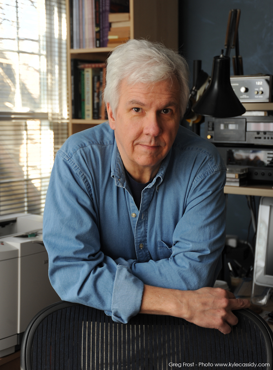 Gregory Frost